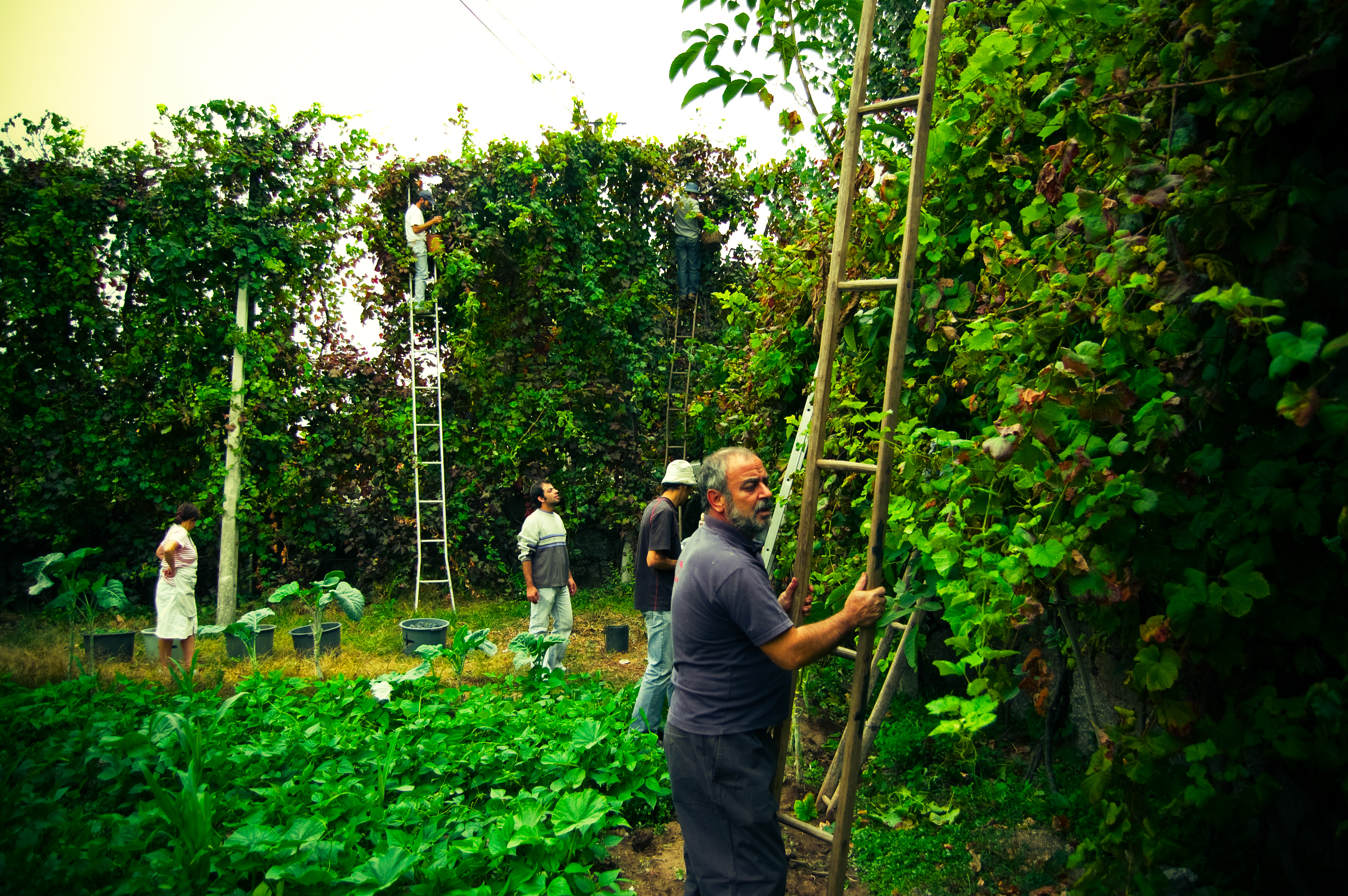 Vindima em Guimarães,Portugal